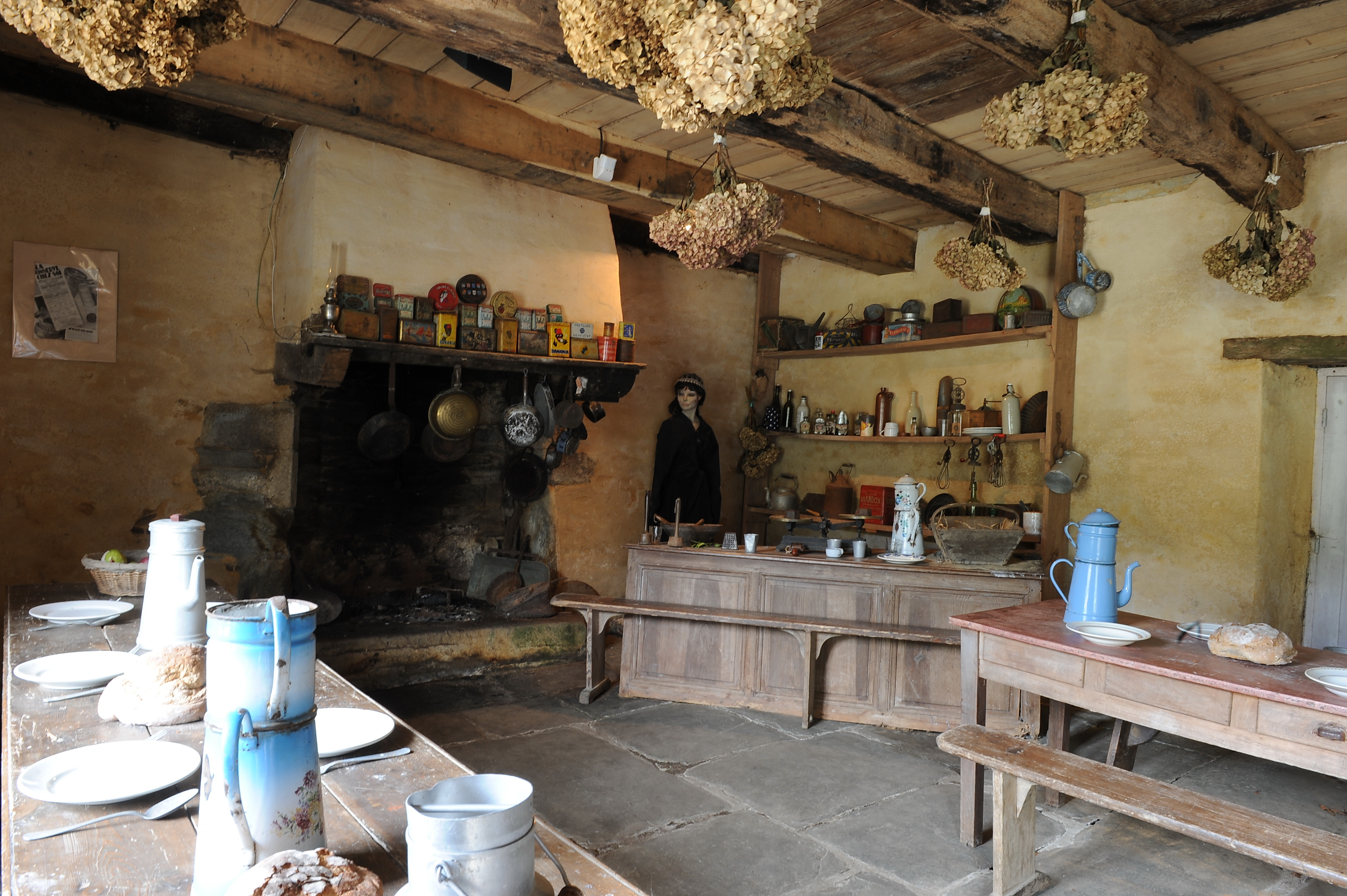 Reconstitution de la cantine des Forges des Salles